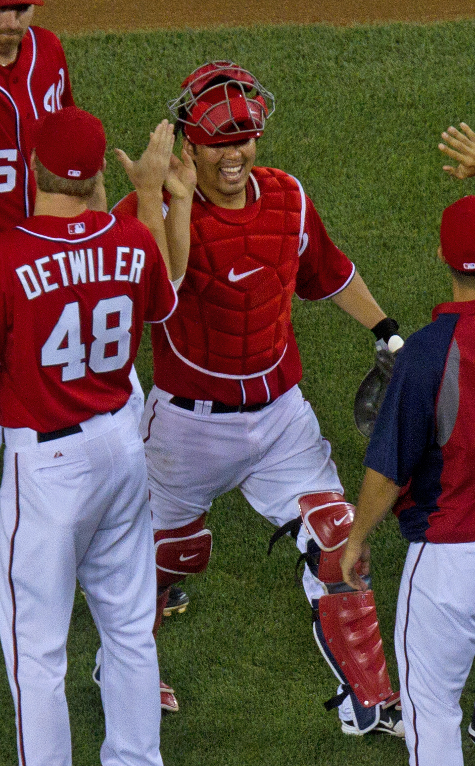 Kurt Suzuki